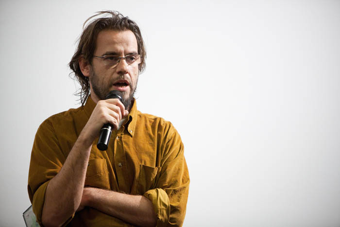 Il regista Andrea Segre.